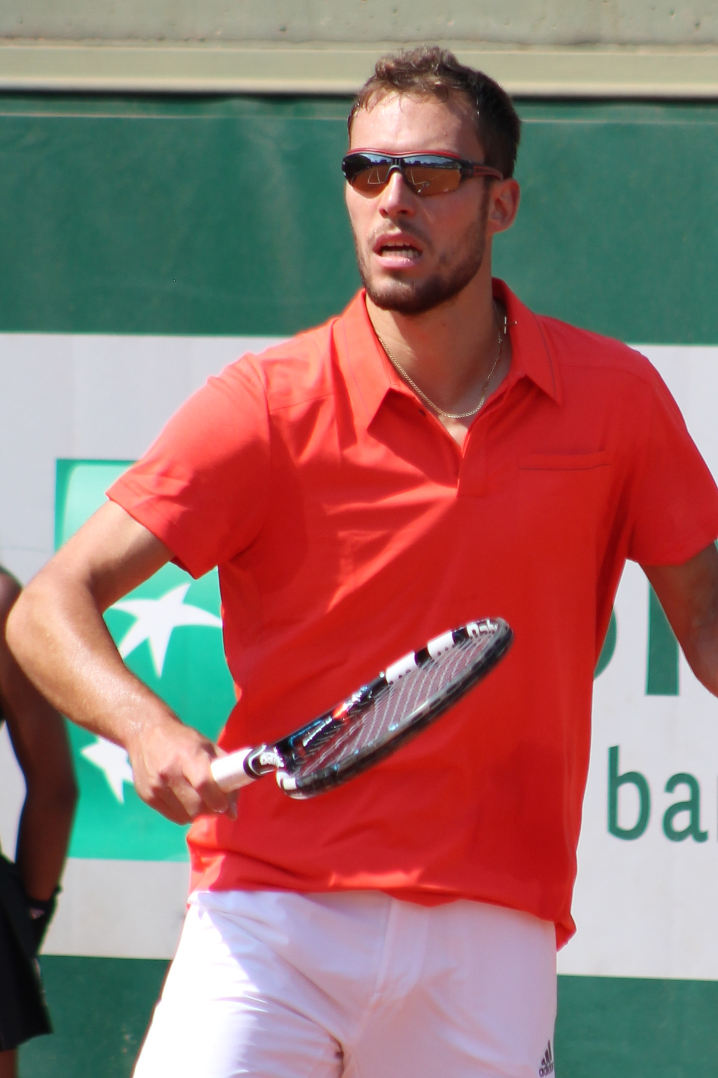 Janowicz RG15 (18)